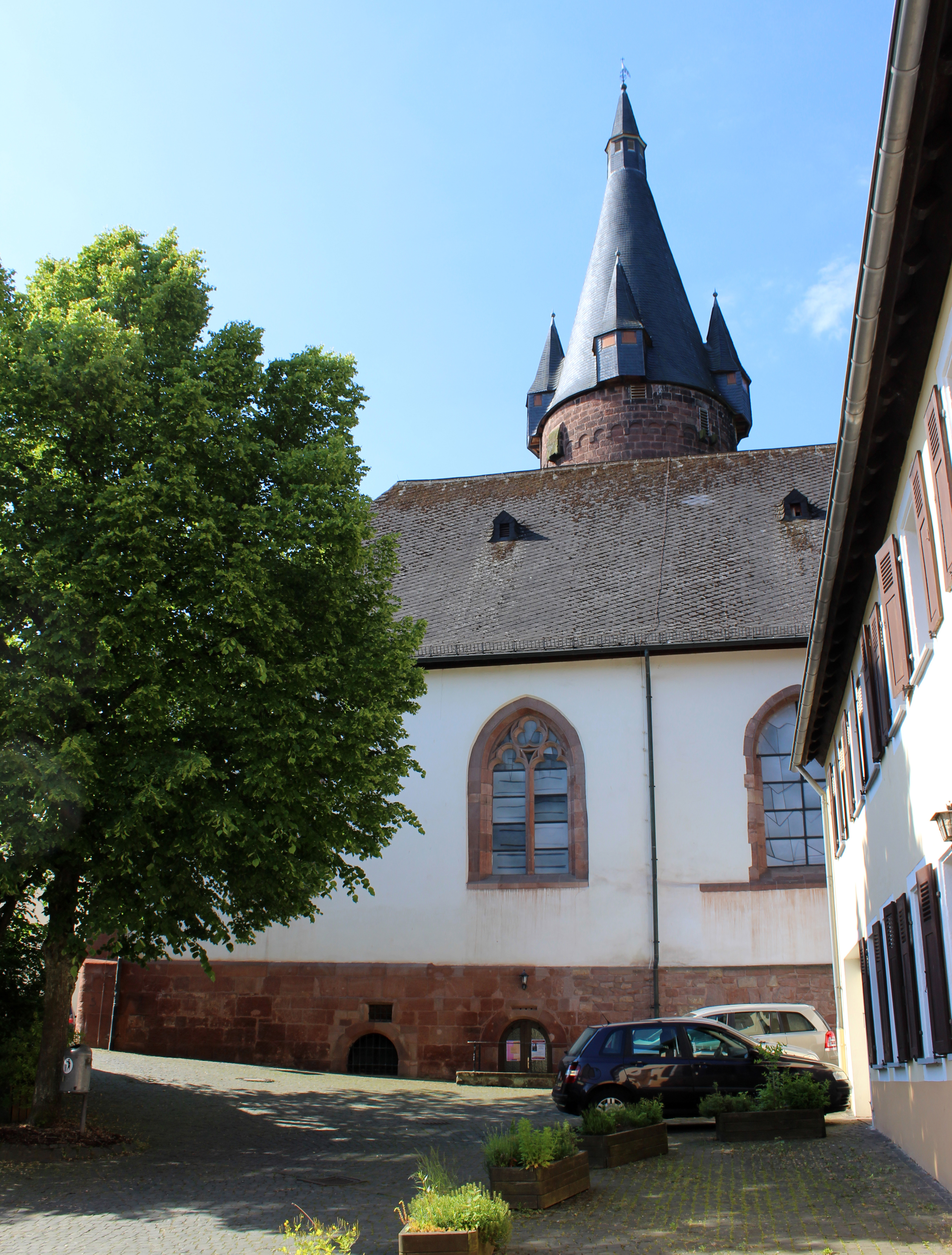 Die evangelische Kirche in Ottweiler, Landkreis Neunkirchen, Saarland